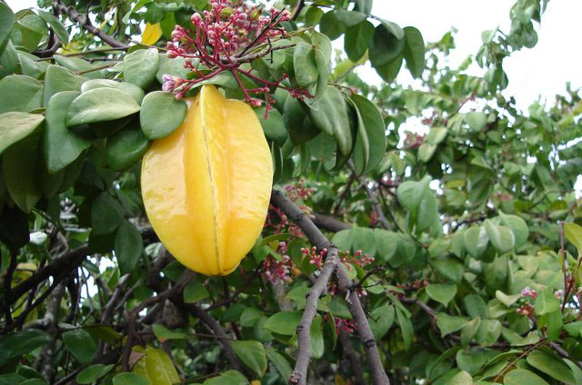 Carambola